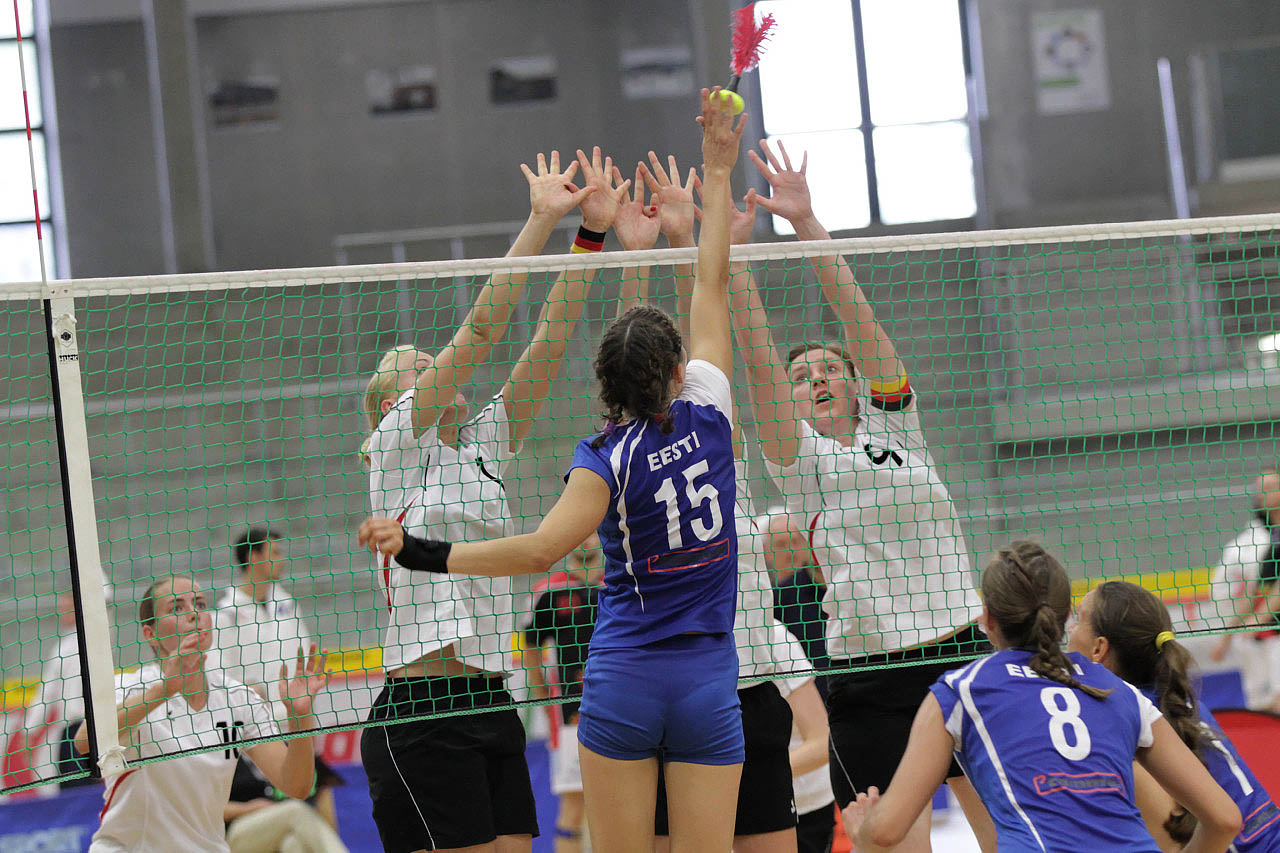 Block des gegnerischen Angriffs